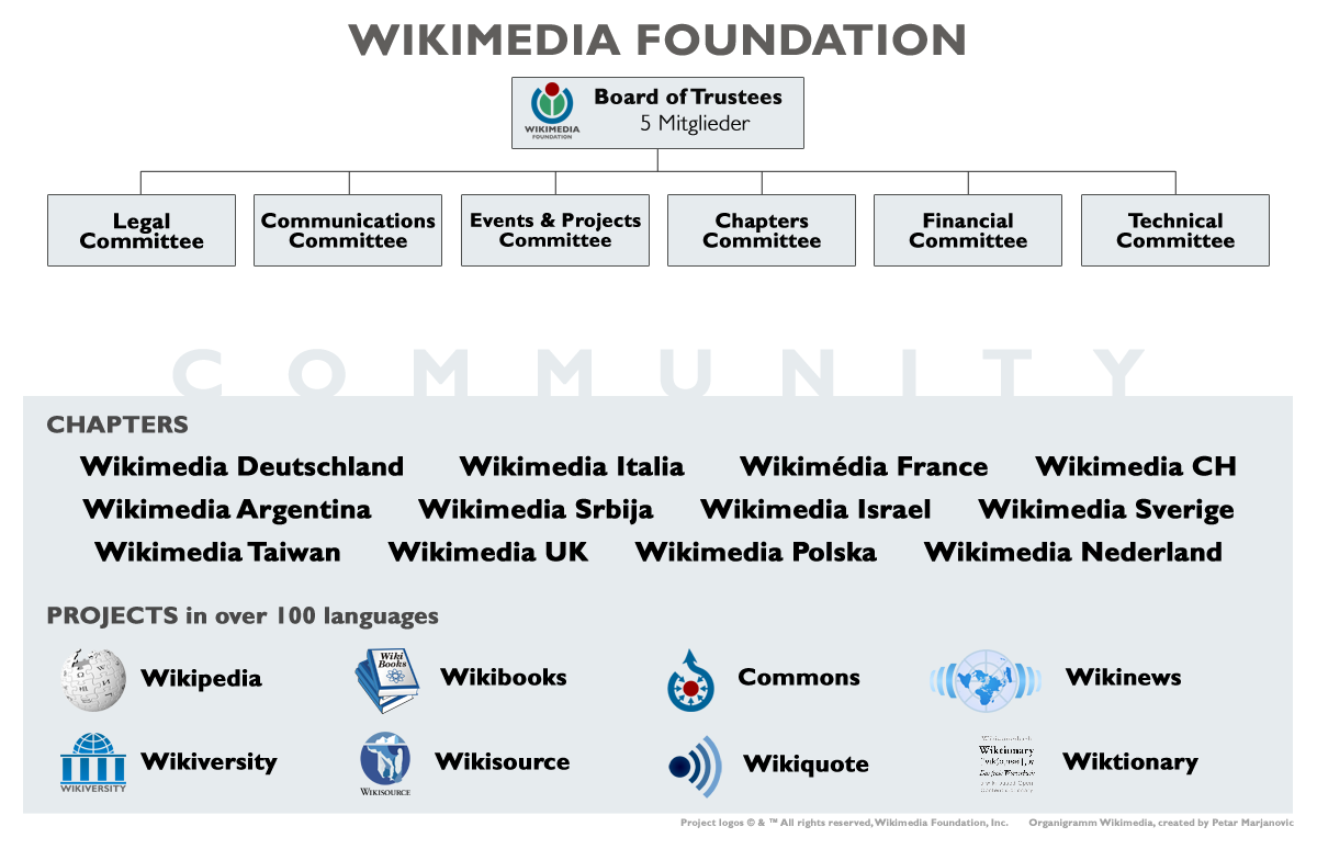 Wikimedia Organigramm 2008